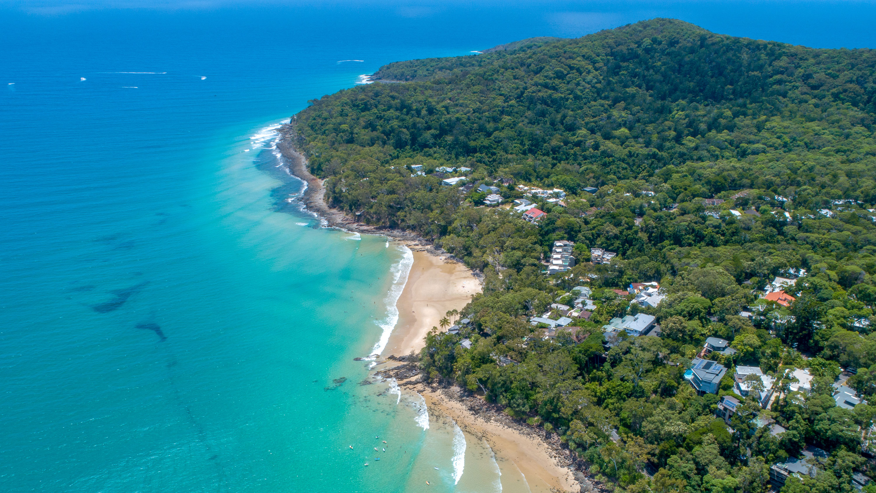 Drone photo of the Noosa National Park from above Noosa Main Beach